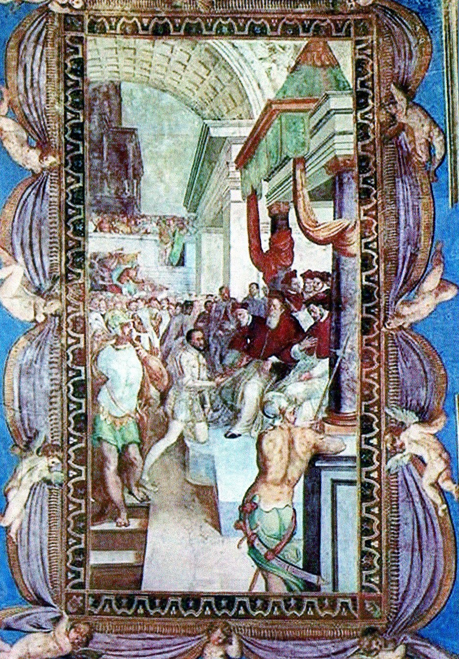 Ascanio della Corgna (affresco nel Palazzo di Castiglione del Lago)